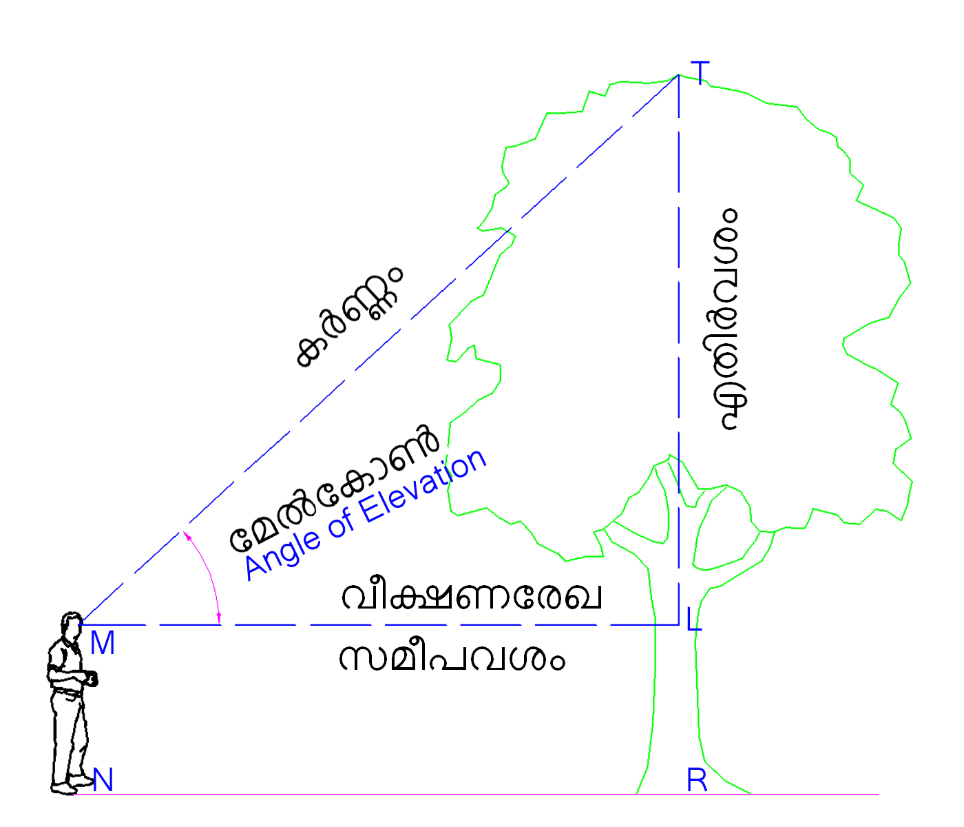 മേൽകോൺ - Angle of Vision - Trigonometry